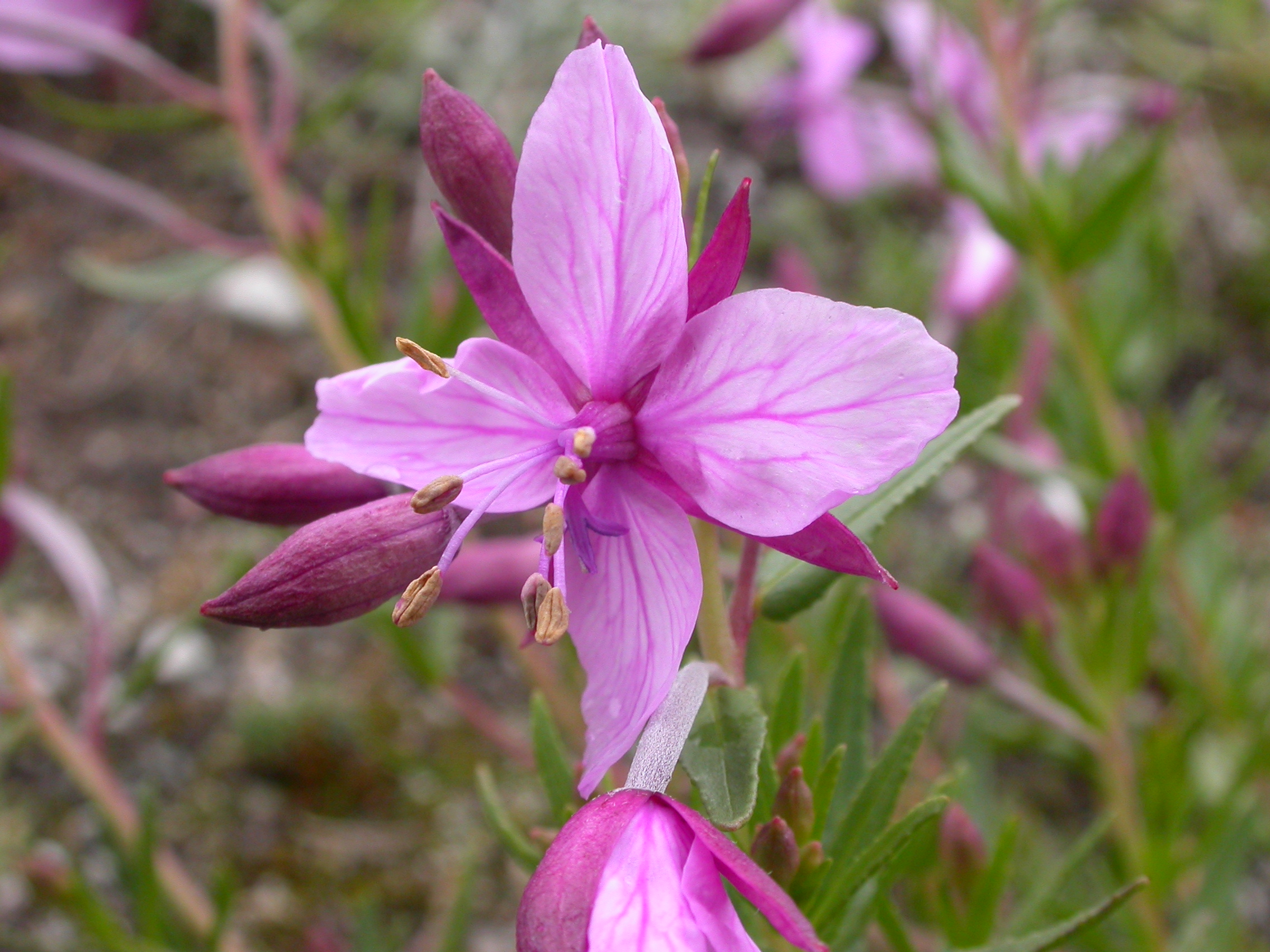 Epilobium fleischeri Zermatt, Riffelberg (Kanton Wallis, Switzerland), 2500 m Author: Barbara Studer – own photograph Date: 2.08.06